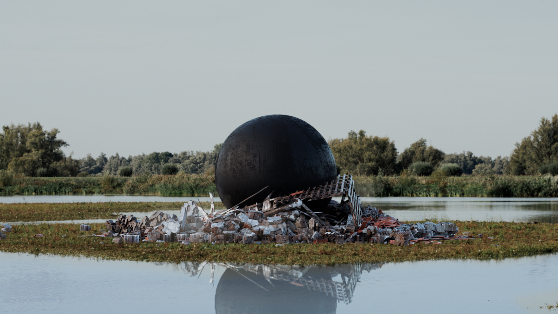 Begin 2020 maakte het Belgische kunstenaarsduo Daems van Remoortere de installatie ‘Ballooning a House’. Dit is een trompe l'oeil waar een huis te zien is dat geleidelijk uit elkaar valt door een ballon die van binnenuit steeds groter wordt.